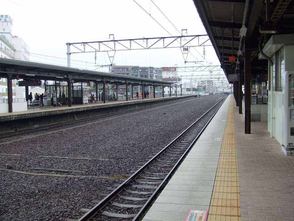 JR九州別府駅（大分県別府市）の撤去された中線跡